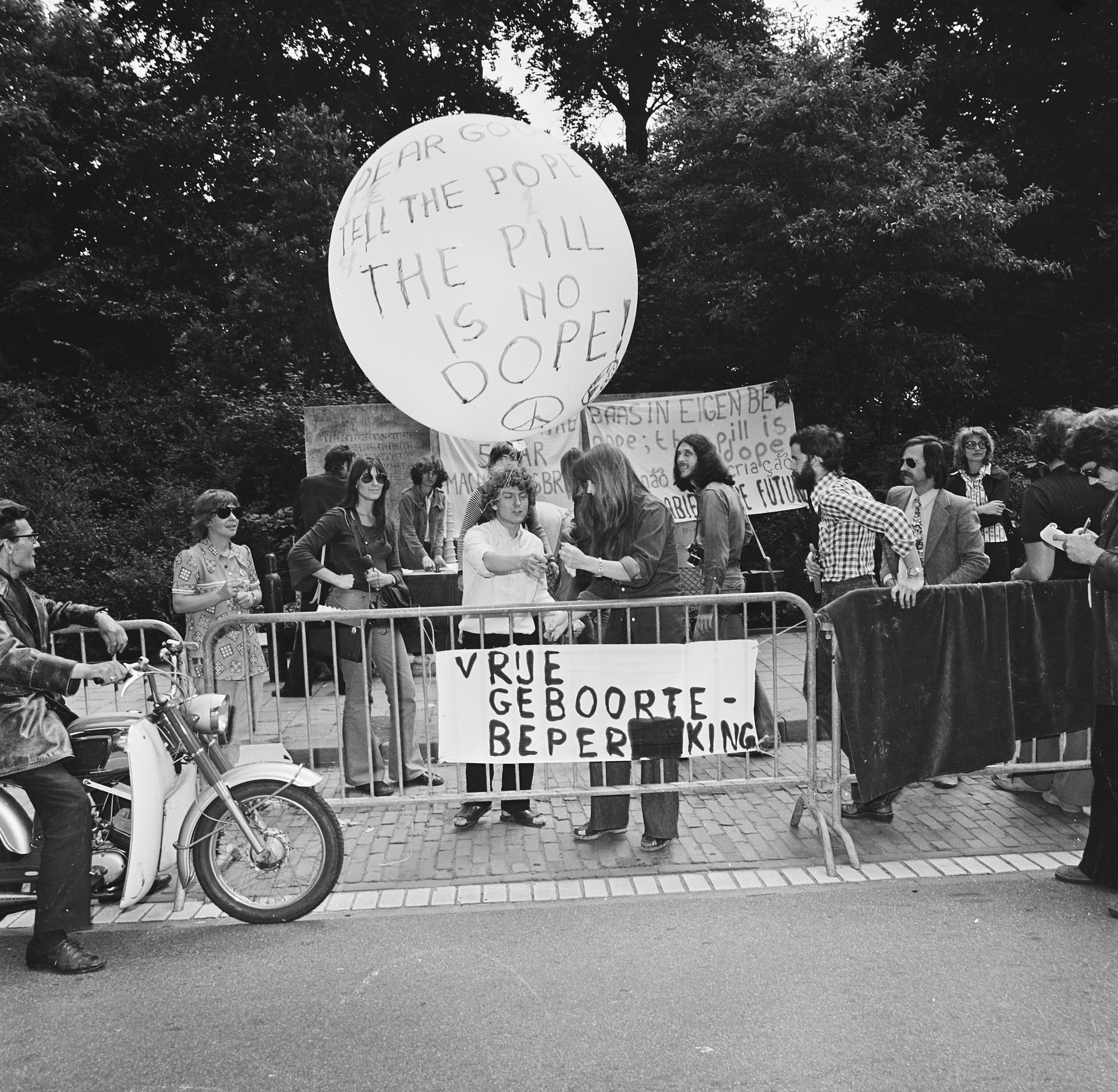 Collectie / Archief : Fotocollectie Anefo Reportage / Serie : [ onbekend ] Beschrijving : Dolle Mina beweging te Den Haag tegen voorschriften geboortebeperking RK-kerk, ballon wordt opgelaten Dear god tell pope pill is no dope Datum : 25 juli 1973 Locatie : Den Haag, Zuid-Holland Trefwoorden : protesten Persoonsnaam : Pauselijke Nuntius Fotograaf : Mieremet, Rob / Anefo Auteursrechthebbende : Nationaal Archief Materiaalsoort : Negatief (zwart/wit) Nummer archiefinventaris : bekijk toegang 2.24.01.03 Bestanddeelnummer : 926-5692